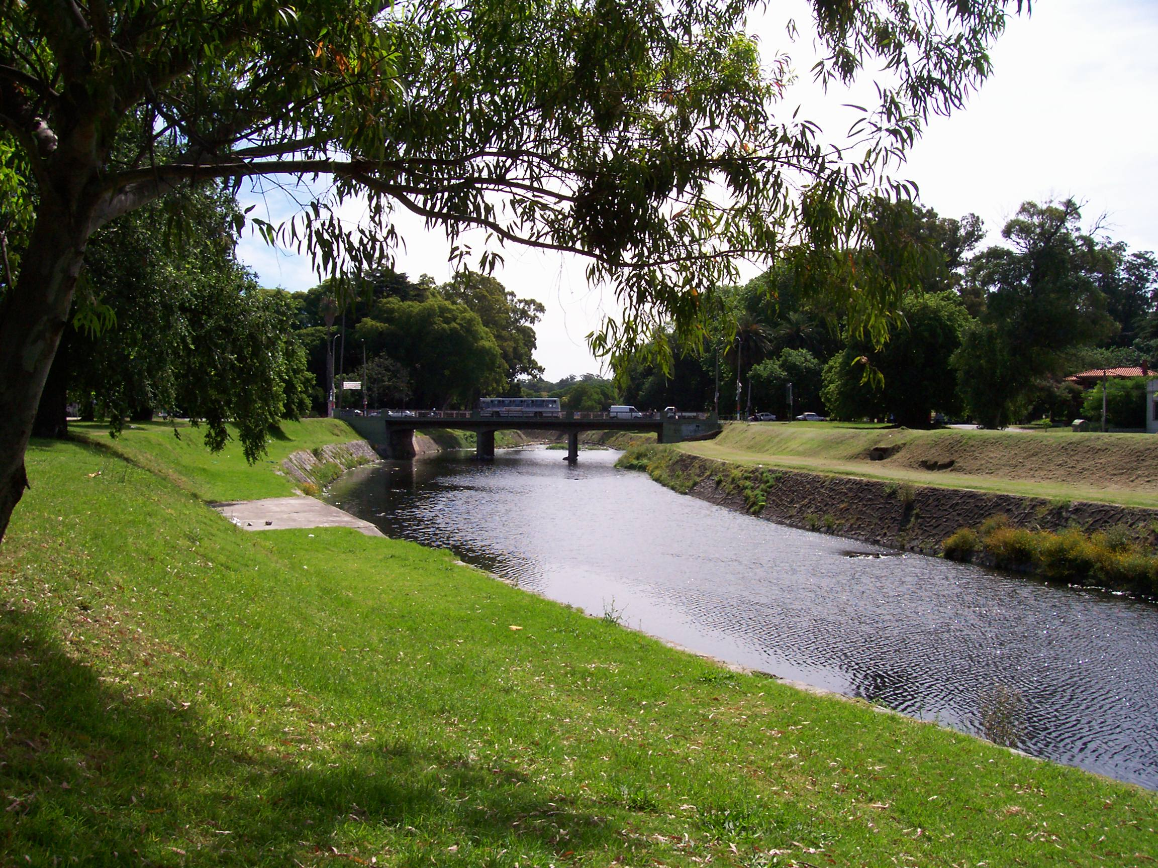 El Arroyo Miguelete. Puente de la Avda. Millán sobre el arroyo.